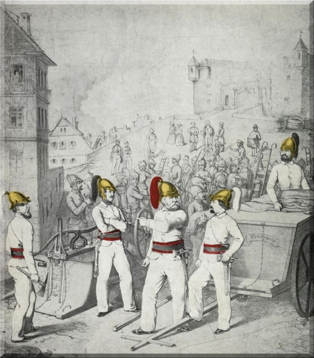 Ältestes Bild der 1847 gegründeten Freiwilligen Feuerwehr Tübingen. Die Feuerwehrleute im hellen Drillich der Turner sind in der Burgsteige vor dem Unteren Schlossportal dargestellt. Links die abgeprotzte damals neuangeschaffte Metz-Stadtfeuerspritze und rechts der Gerätewagen. Im Hintergrund eine Mannschaft mit Messinghelmen und teilweise mit Hakenleitern, links der Signalhornbläser, rechts hinten der dicke Büttel mit Säbel. Die folgenden Feuerwehrleute sind durch kolorierte Messinghelme hervorgehoben (von links): Lenz (mit weißem Busch) W. Dannwolf (mit schwarzem Busch) Julius Haller (Feuerwehrmann 1847–1880) Der Kommandant (mit rotem Busch) Carl Wüst (mit weißem Busch) Hayes (mit schwarzem Busch)